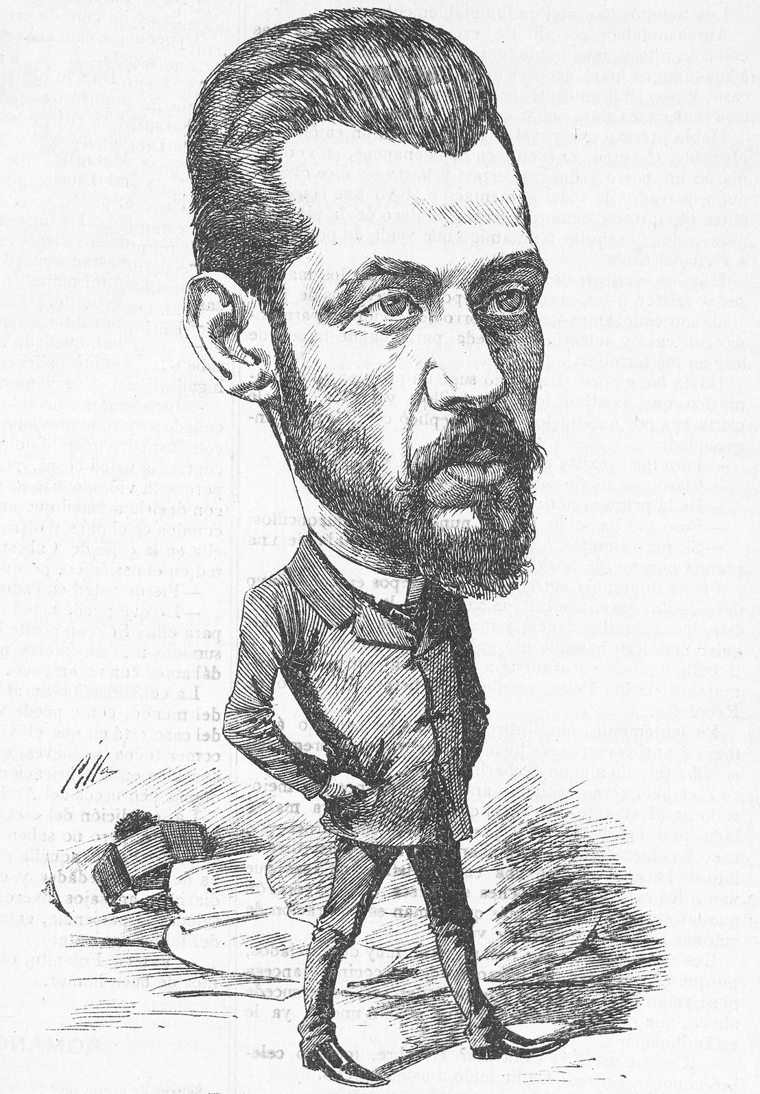 Luis de Ansorena.